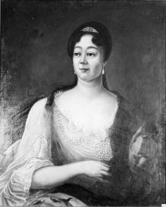 Luise Elisabeth von Sachsen-Merseburg (* 04. März 1673 in Bernstadt; † 28. April 1736 Forst (Lausitz)) Herzogin aus dem Haus Württemberg-Oels